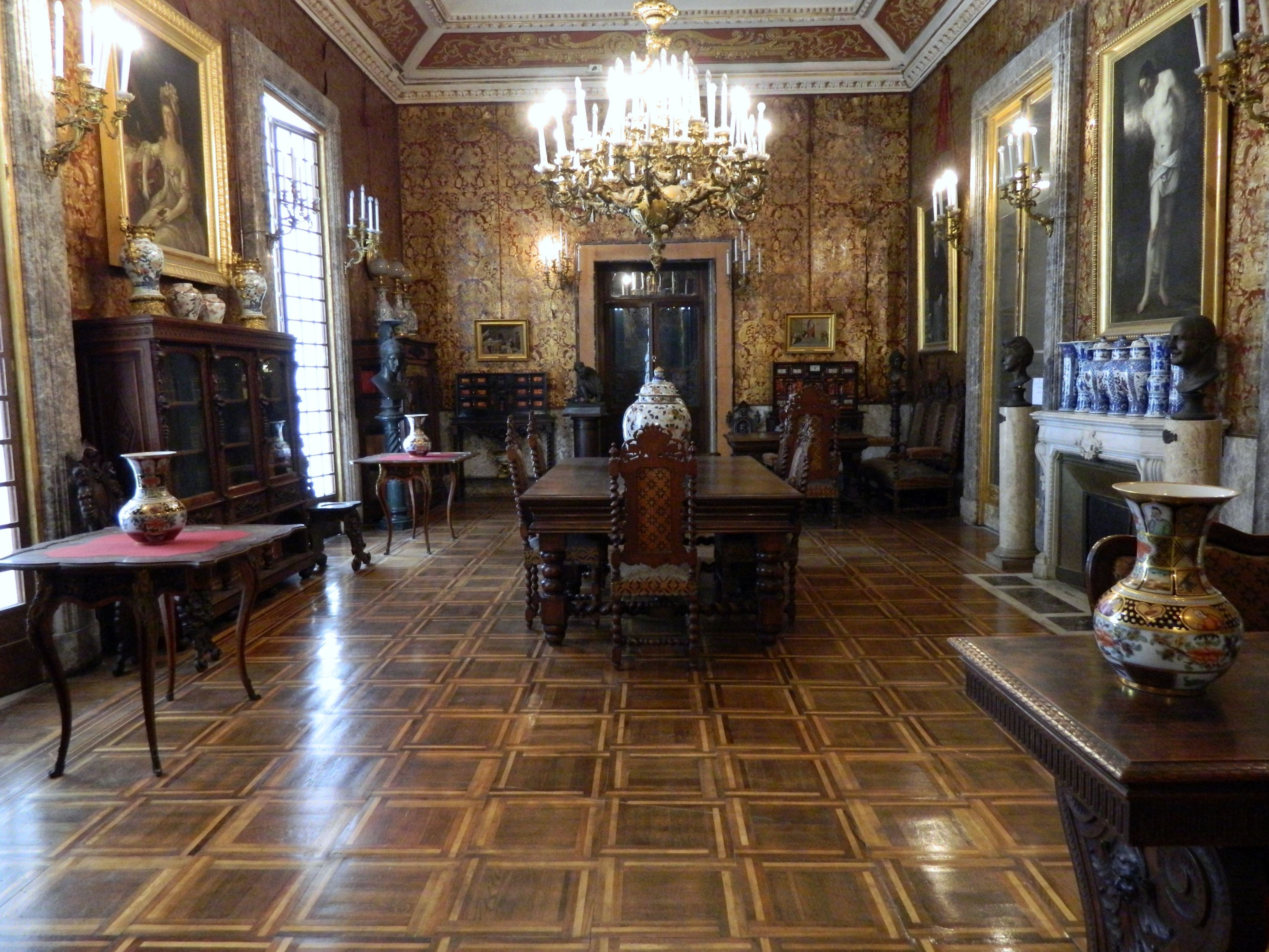 Villa Pignatelli (Napoli) - Biblioteca